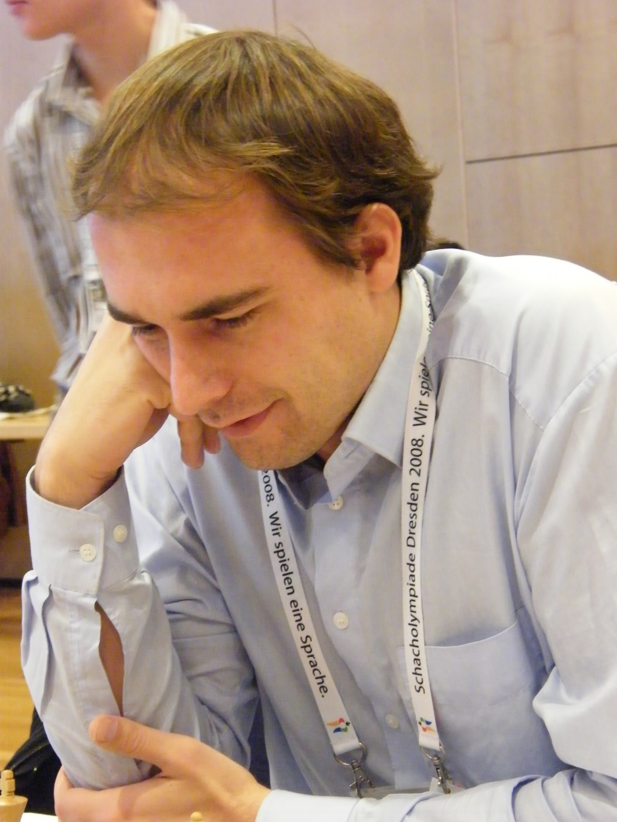 Kaido Kulaots bei der 38. Schacholympiade in Dresden 2008